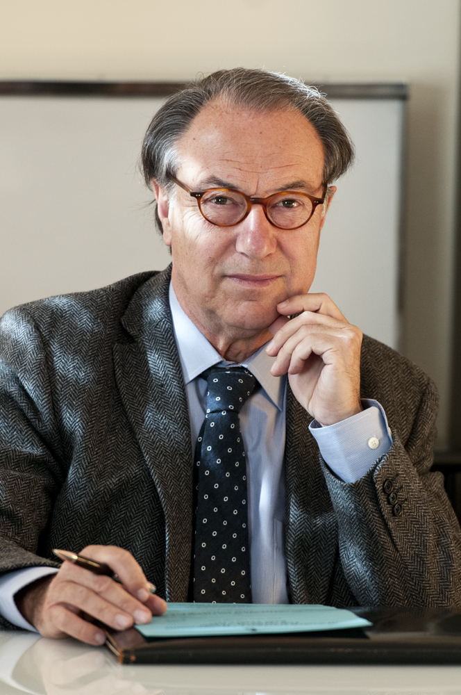 Ferran Morell Brotad neumólogo